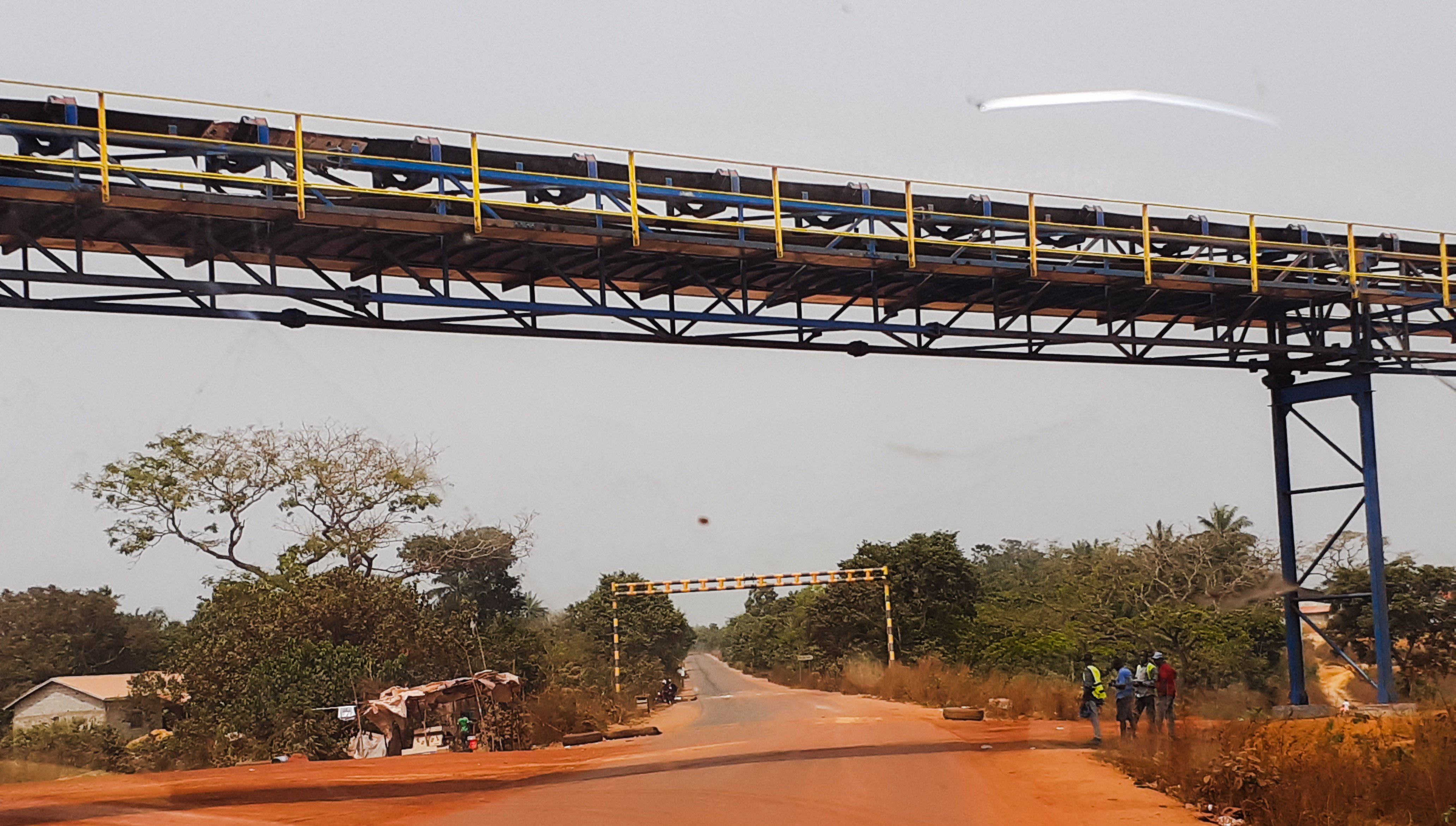 Transport de Bauxite a Boffa This is an image with the theme "Africa on the Move or Transport" from: Guinea